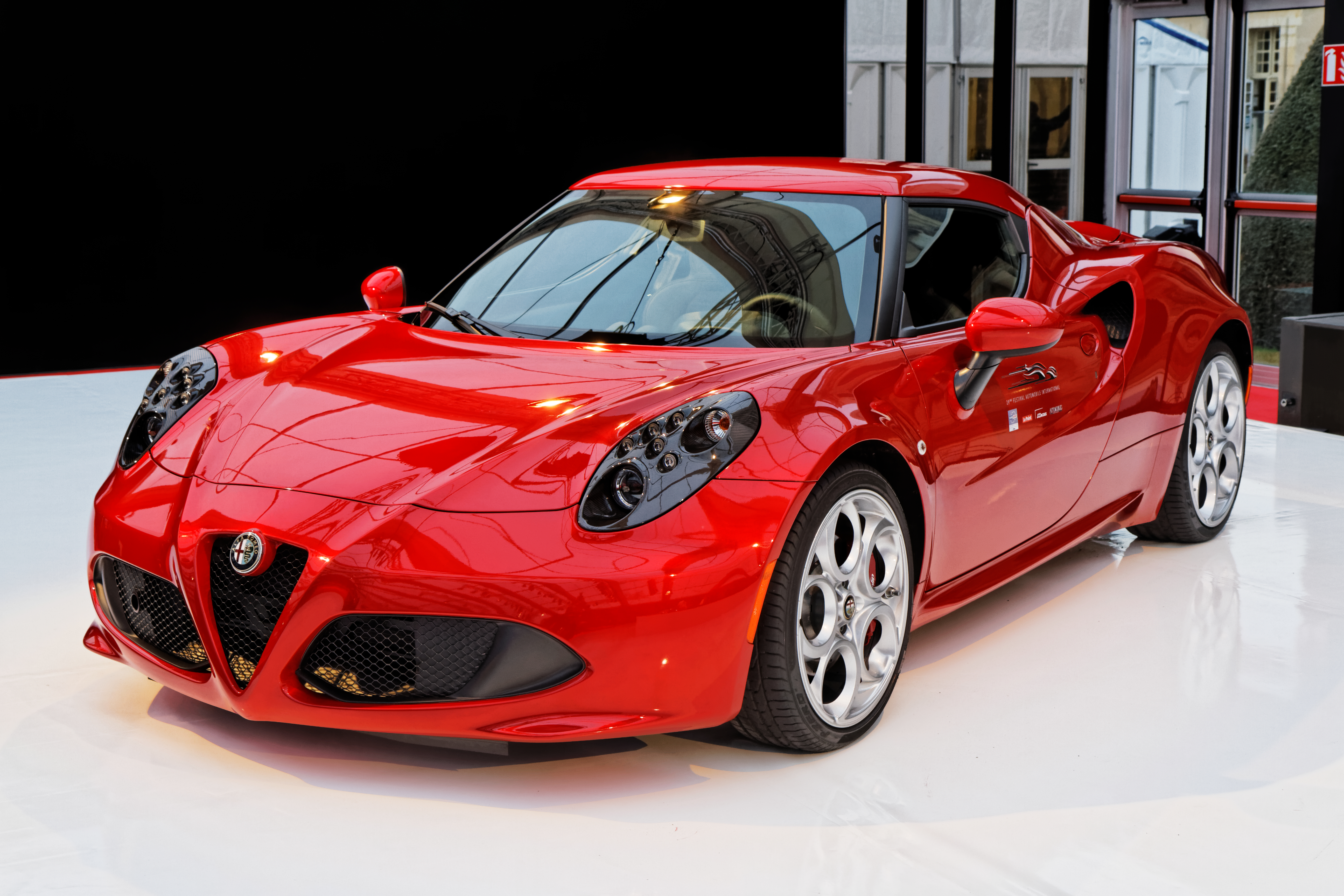 L'Alfa Romeo 4C exposée lors du festival automobile international 2014.